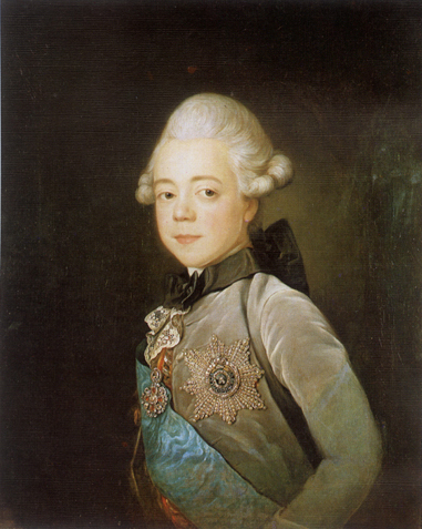 Портрет Великого князя Павла Петровича Художник Ж.-Л. Вуаль